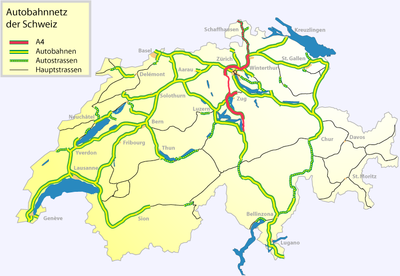 Verlauf der Autobahn A4 in der Schweiz